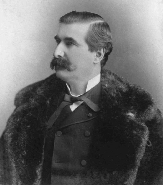 Honoré Mercier (15 octobre 1840 - 30 octobre 1894) était un avocat, un journaliste et un politicien du Québec, au Canada. Il fut premier ministre du Québec du 27 janvier 1887 au 21 décembre 1891, étant le chef du Parti libéral.